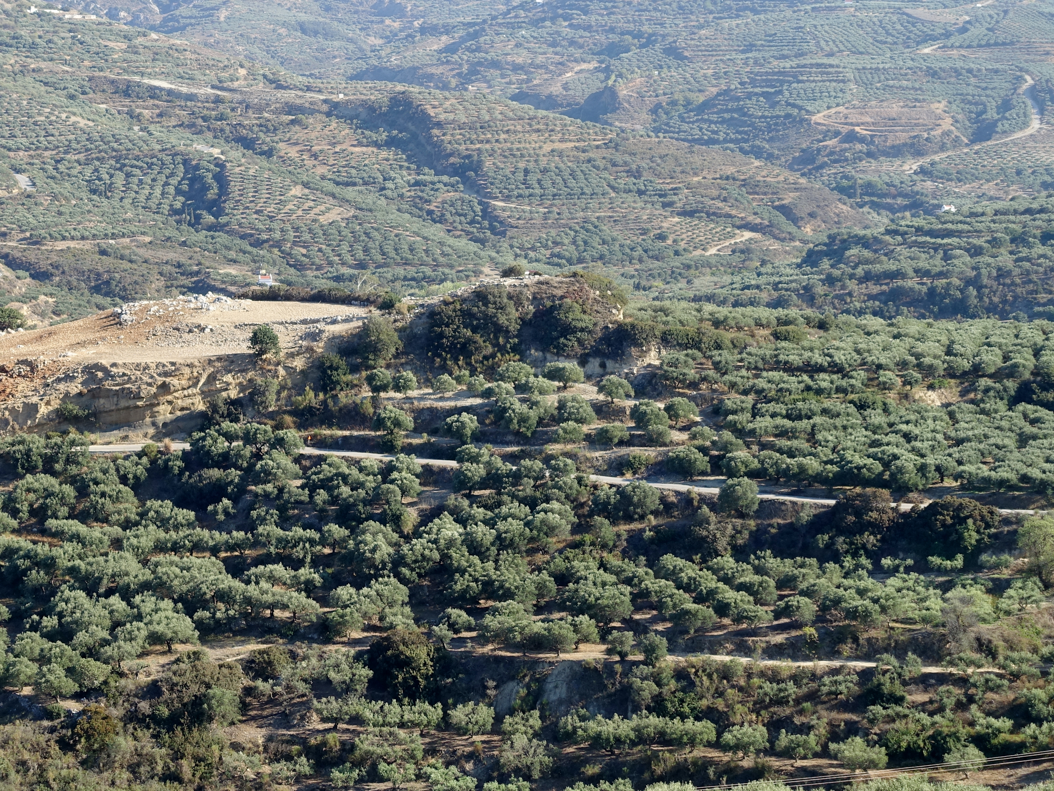 Minoischen Villa von Agios Georgios (Άγιος Γεώργιος), Gemeinde Sitia, Kreta, Griechenland